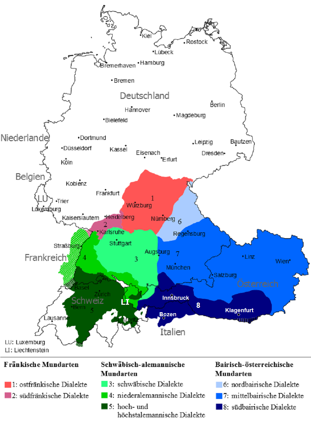 Oberdeutsche Mundarten nach 1945 (ohne Fersentalerisch, Zimbrisch)